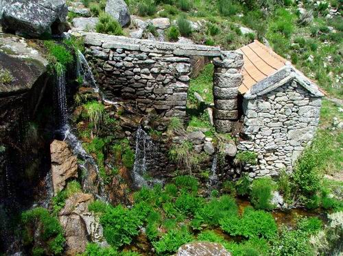 Moinho de rodízio tipo Arubah em Atilhó, concelho de Boticas.